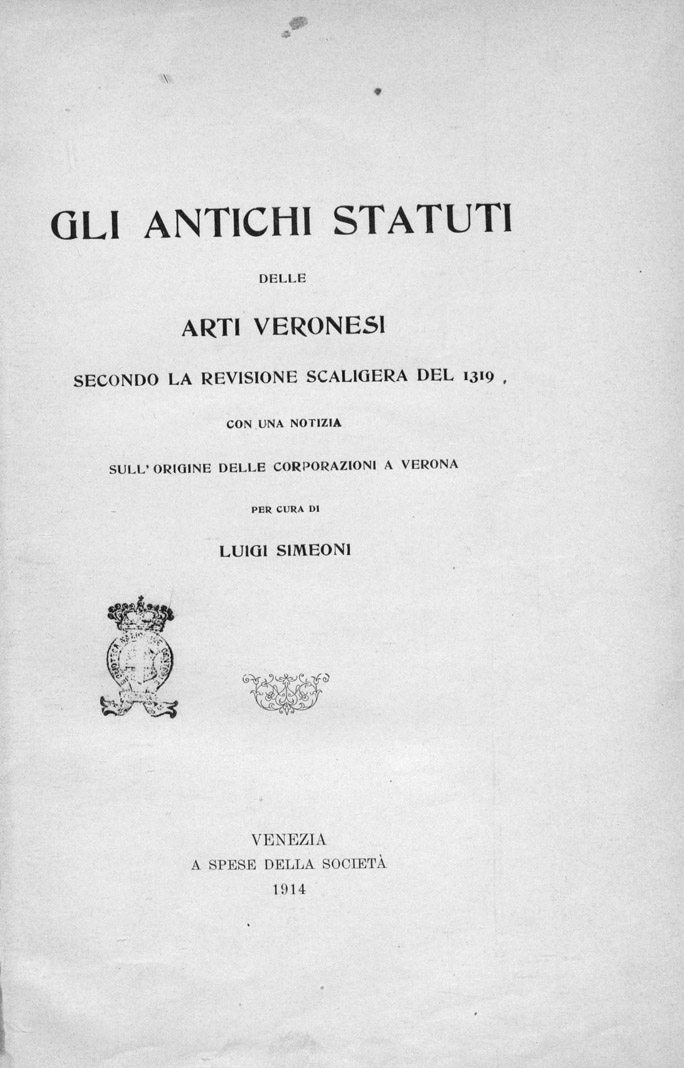 Frontespizio